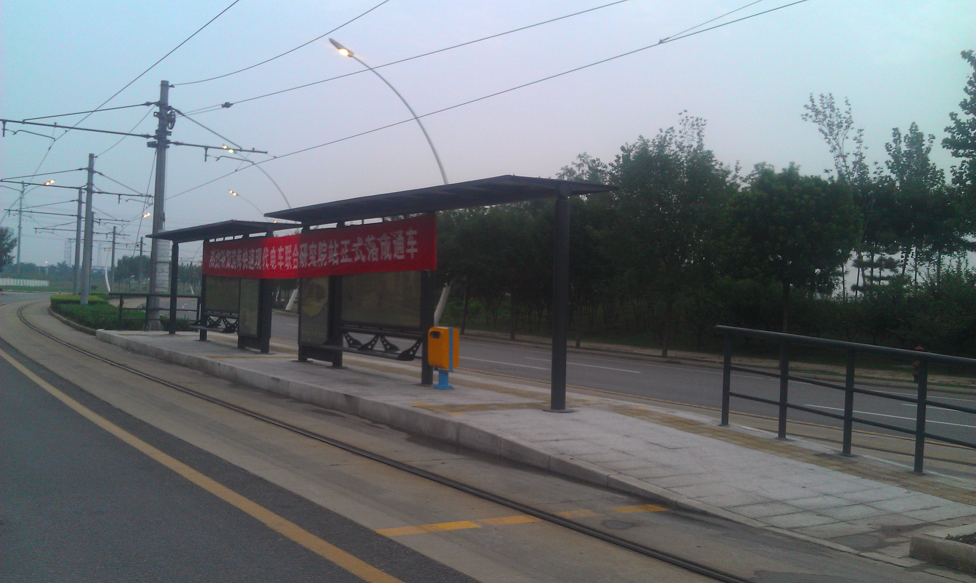 天津市开发区导轨电车一号线联合研究院站